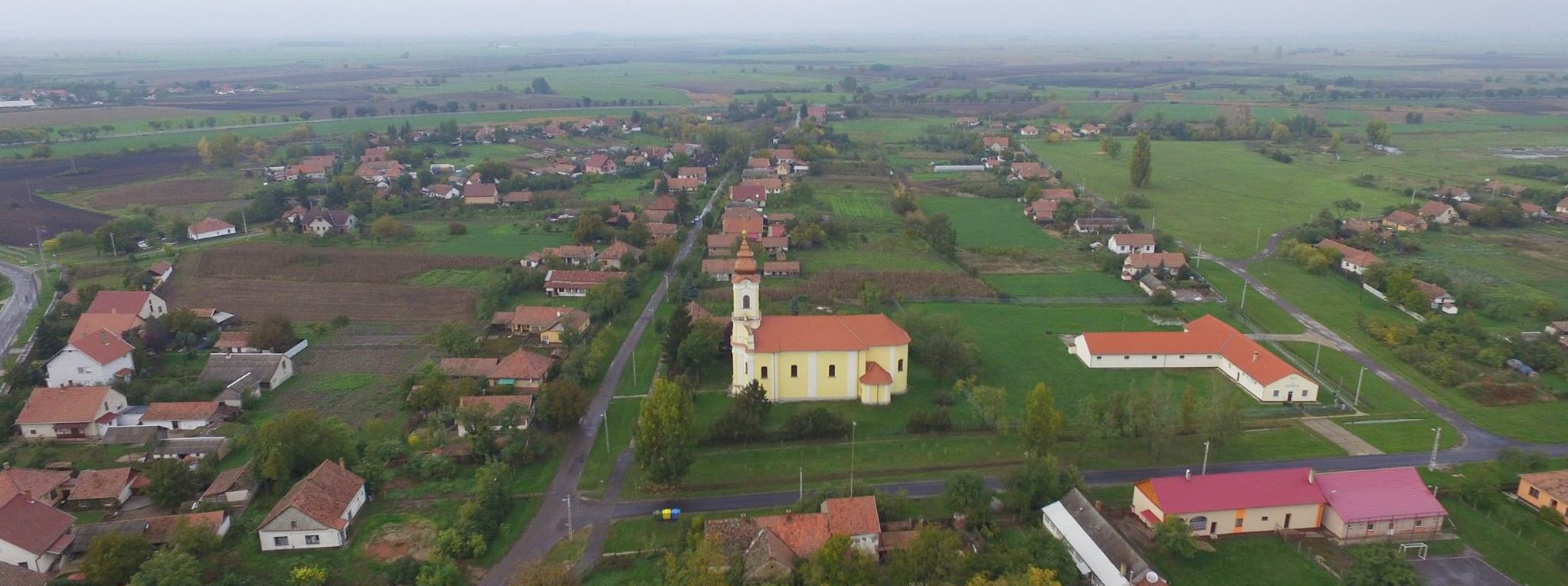 Drónfelvétel Furtáról. Középen a Szent László rk. templom.